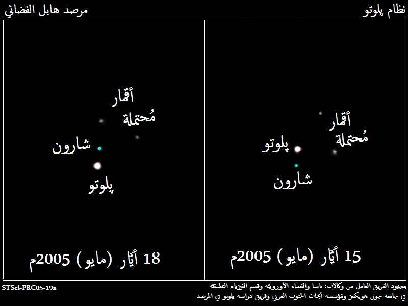 صُور اكتشاف الأقمار الپلوتونيَّة پ1 وپ2. الصُورة المُعززة المُلونة لِپلوتو (الجُرم الأكثر لمعانًا)، وشارون (يسار پلوتو) تمَّ تجميعها وتركيبها باستعمال صُور قصيرة التعرُّض التُقطت بواسطة مُرشحات على بُعد 475 نانومتر (الأزرق) و555 نانومتر (الأصفر المُخضرّ). صُنعت صُور الأقمار الجديدة بواسطة لقطات أكثر تعرُّضًا وباستخدام مُرشحٍ وحيد على بُعد 606 نانومتر (بالأصفر)، وليس هُناك من معلوماتٍ مُستقاة منها بشأن لونها.